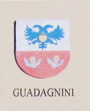 Cognomi storici dei Vicini che discendono dalle famiglie della Regola che abitavano a Predazzo e riguardano 19 cognomi: Boninsegna, Bonora, Bosin, Brigadoi, Defrancesco, Degaudenz, Dellagiacoma, Dellantonio, Dellasega, Demartin, Dezulian, Felicetti, Gabrielli, Giacomelli, Guadagnini, Morandini, Nicolao, Piazzi e Zanna.